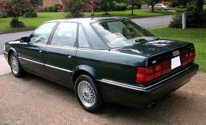 Audi V8 Quattro